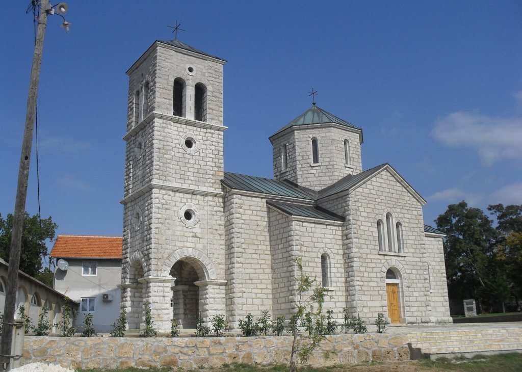 Манастир Оћестово. Храм СПЦ посвећен Св. великомученици Недјељи у Оћестову, Далмација.